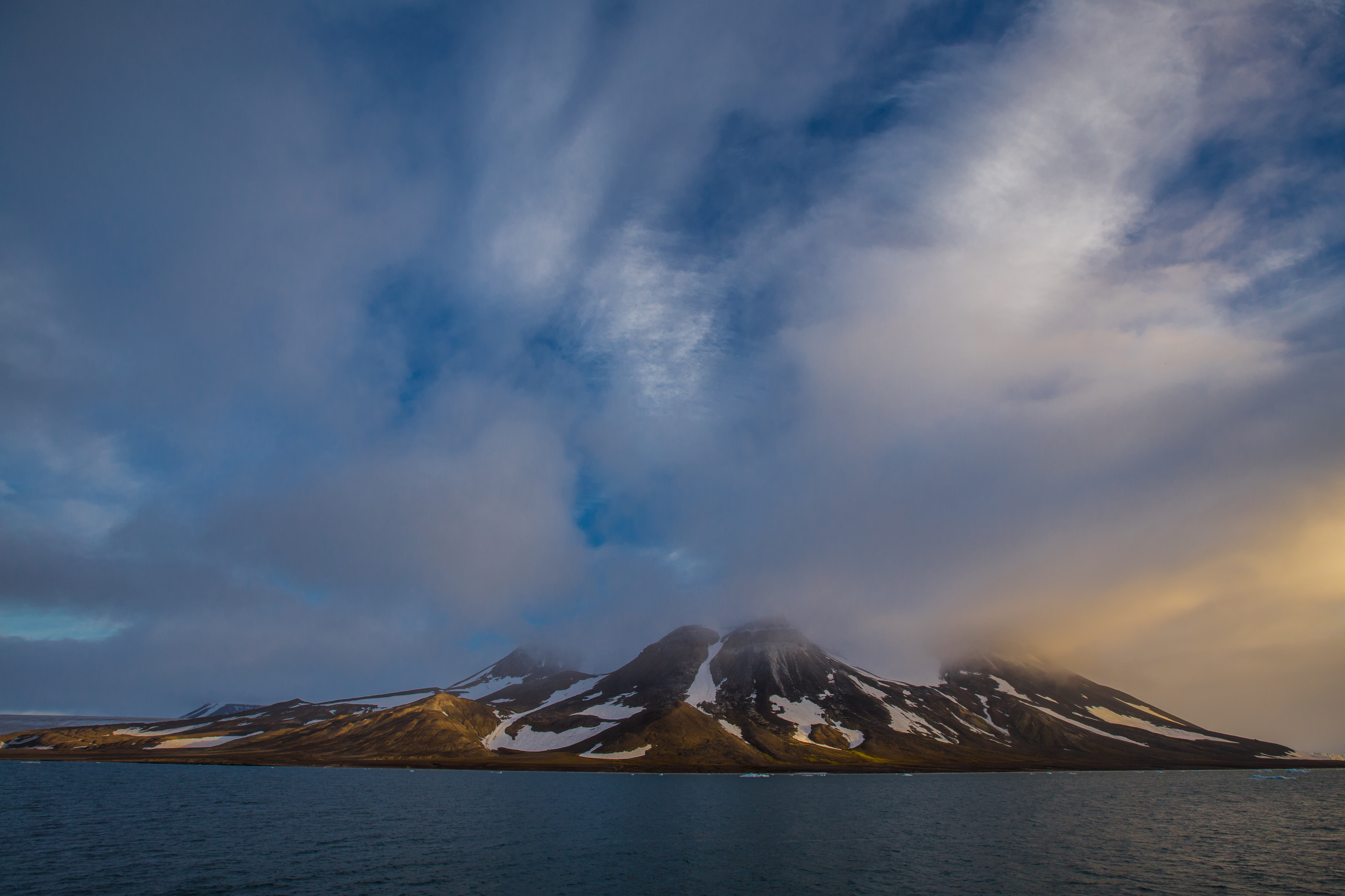 Комплексный заказник Земля Франца-Иосифа, Приморский район This image is related to the protected area of Russia number 2930163